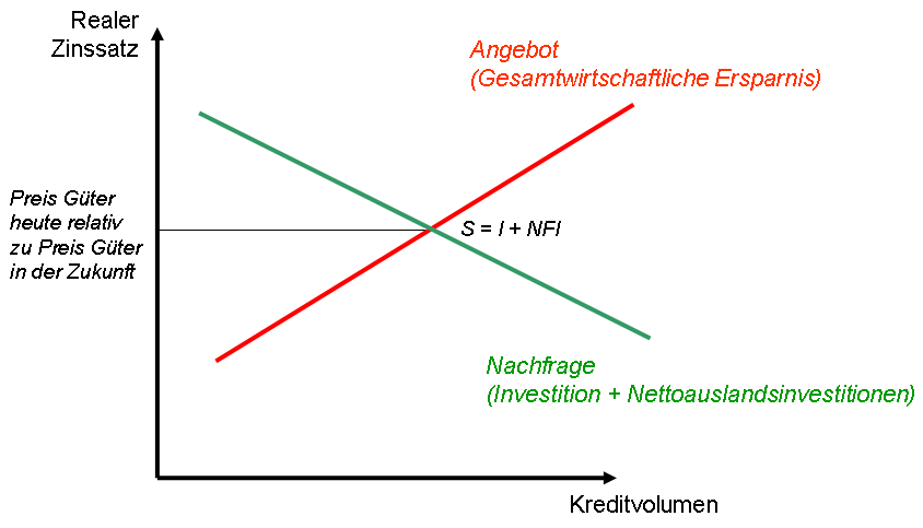 selbst erstellt, gnufdl